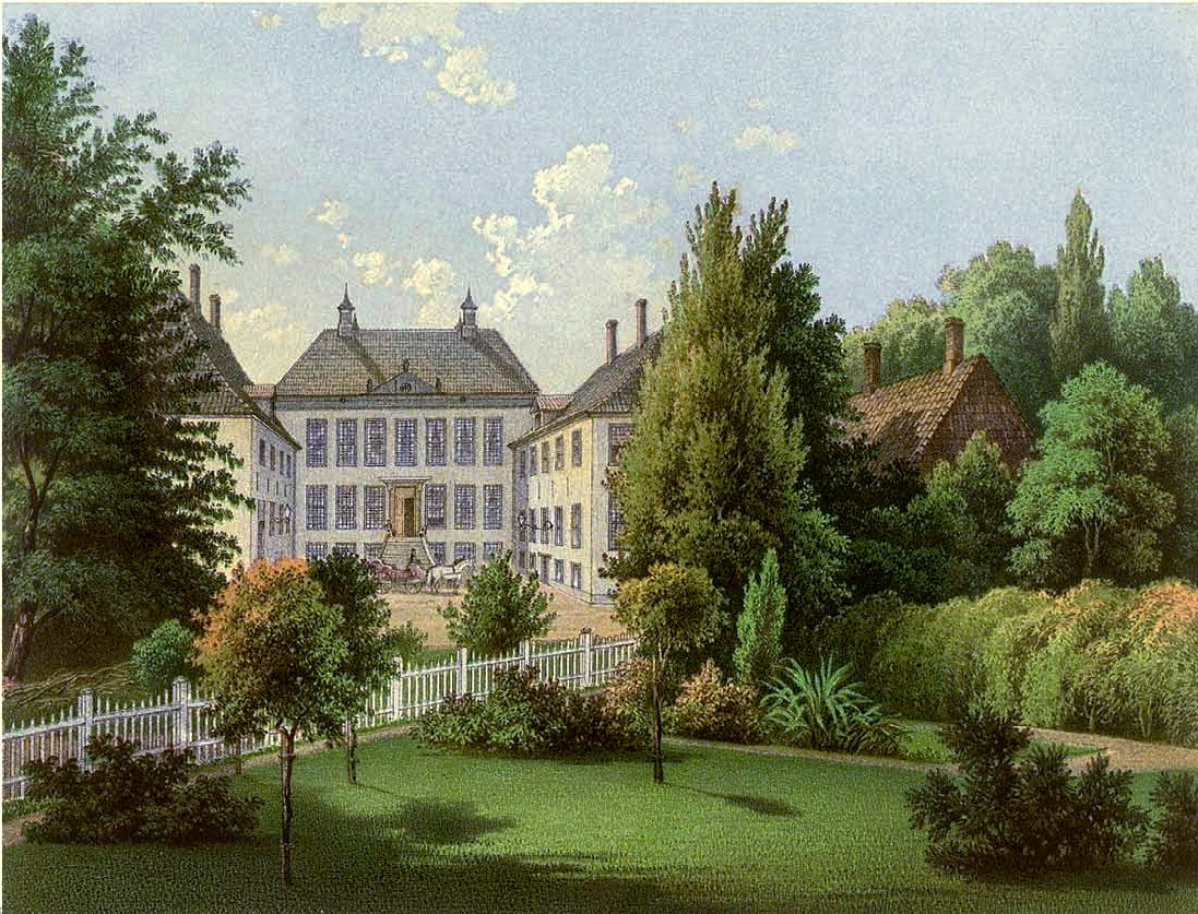 Gut Gelting, Lithographie von Alexander Duncker, 1869